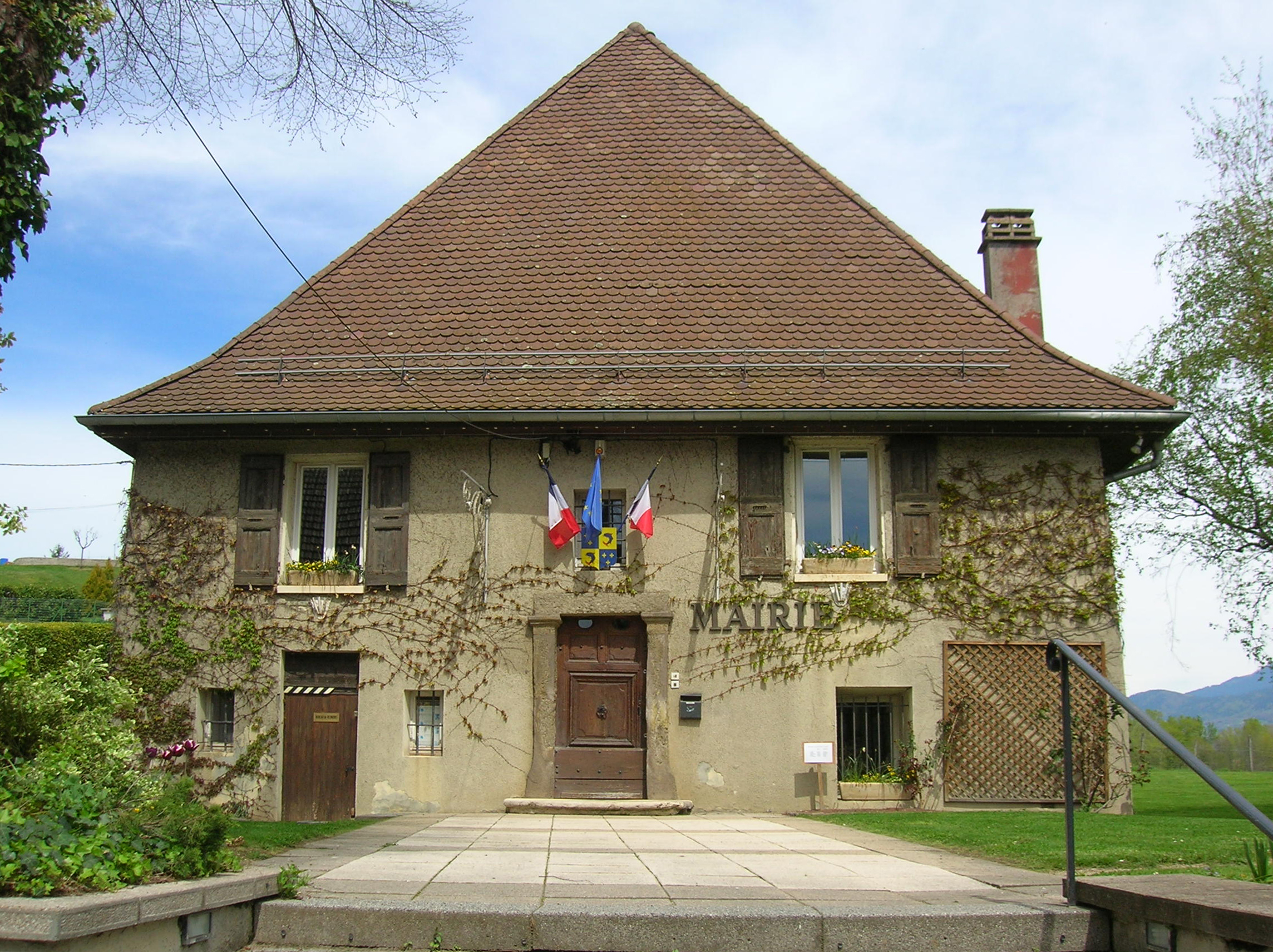 marie de Brié, Brié-et-Angonnes, Isère, Rhone-Alpes, France.